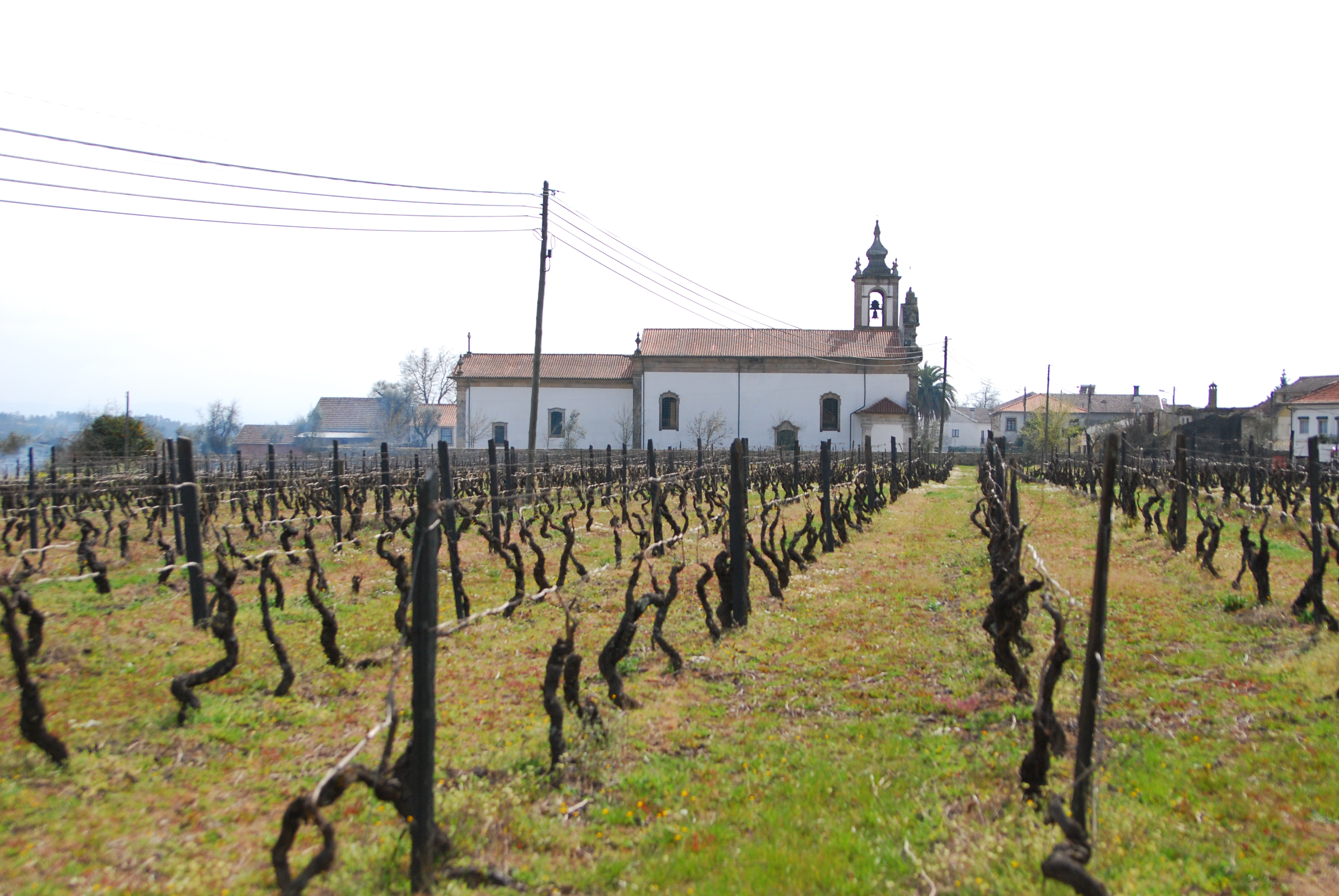 Feld mit Weinanbau und Kirche im Hintergrund in Lobão da Beira im Kreis Tondela in Portugal